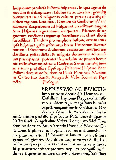 Manuscrito de Compendiosa historia hispánica